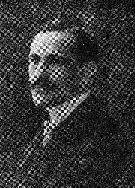 Fernando Martínez Morás, fotografía en Vida Gallega 1910